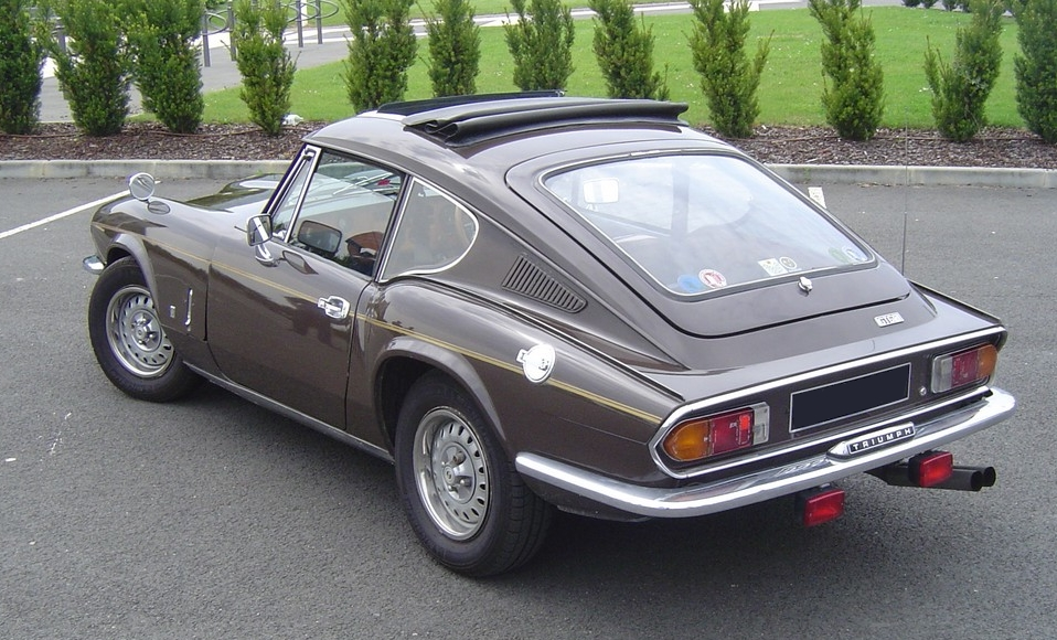 1972 Triumph GT6